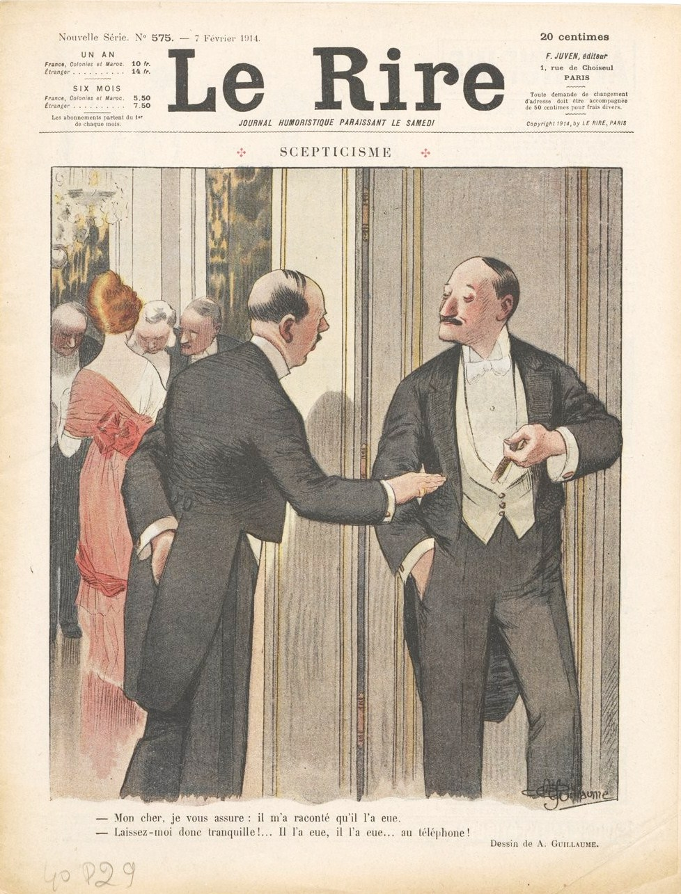 Une de l'hebdomadaire humoristique illustré Le Rire du 7 février 1914 consacré à l'affaire Hégésippe Simon. Illustration : Albert Guillaume.